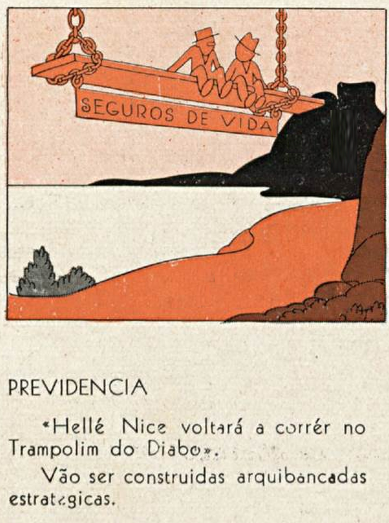 Caricatura de Félix para a revista "Careta", ironizando o acidente sofrido em 1936 com a corredora Hellé Nice, que capotara seu carro na prova "Cidade de São Paulo" e causara a morte de 6 espectadores.